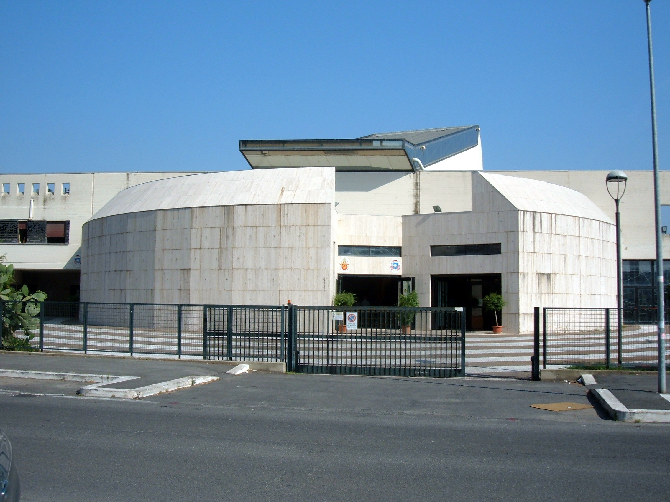 Chiesa dei Santi Aquila e Priscilla, a Roma, nel quartiere Portuense.